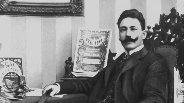 Photo schwarzweiß - Portrait des Berliner Komponisten Paul Lincke